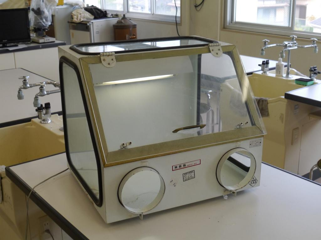 Clean box：古典的な無菌箱 県立高等学校の理科室にて